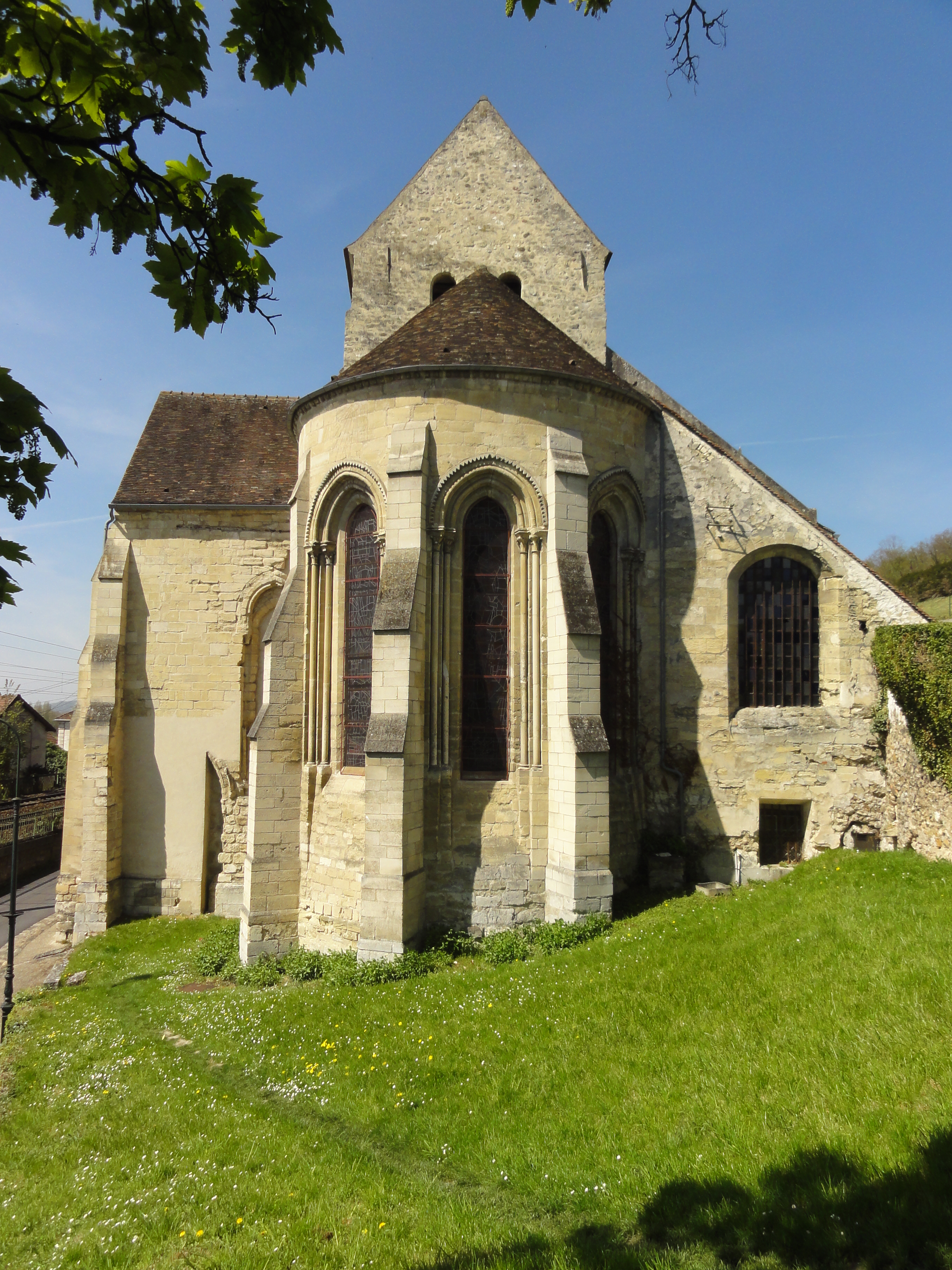 Église Saint-Pierre-aux-Liens de Vaux-sur-Seine - voir titre.